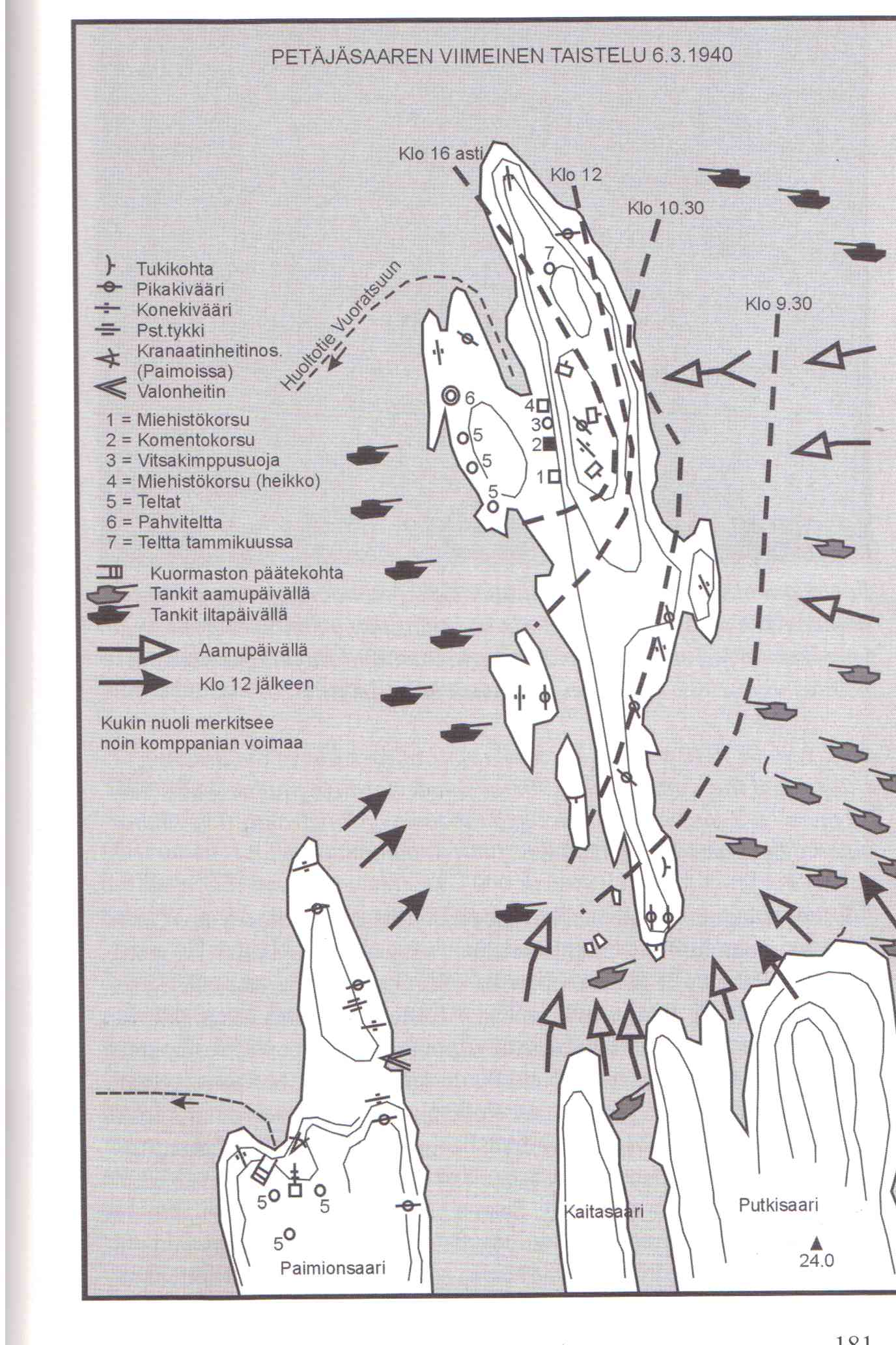 Petäjäsaari piirroskuva, Lauri Immosen kirjasta Unohdettujen rintama